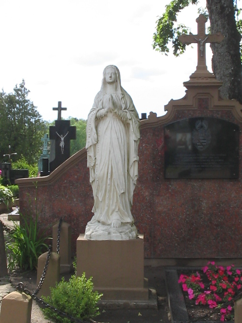 Janinos Pliaterienės kapas